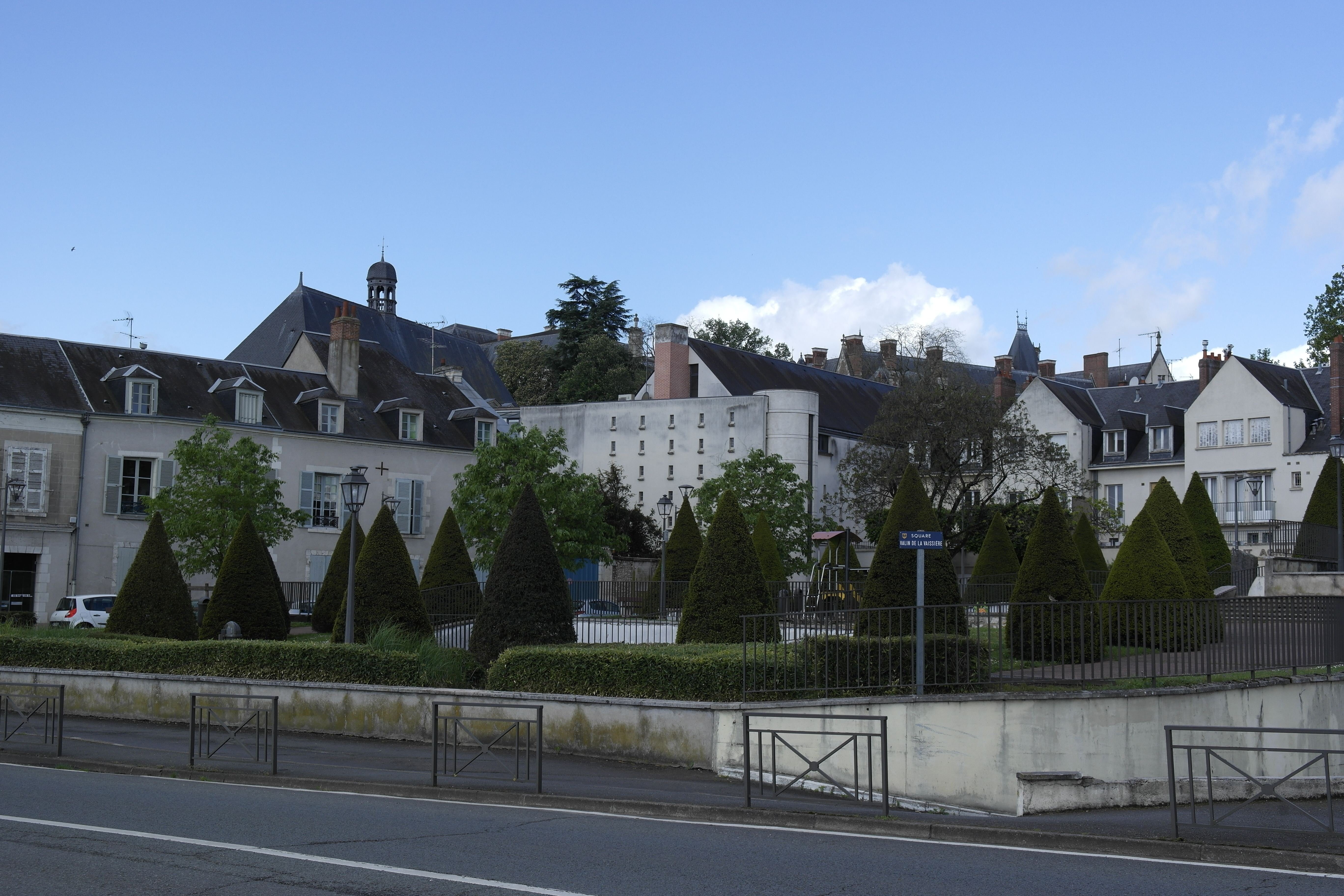 Vue du square Valin-de-la-Vaissière (entre la Loire et la place Louis-XII, à Blois). Emplacement (jusqu'en 1940) de l'ancien collège Augustin-Thierry et de l'abbaye du Bourg-Moyen.